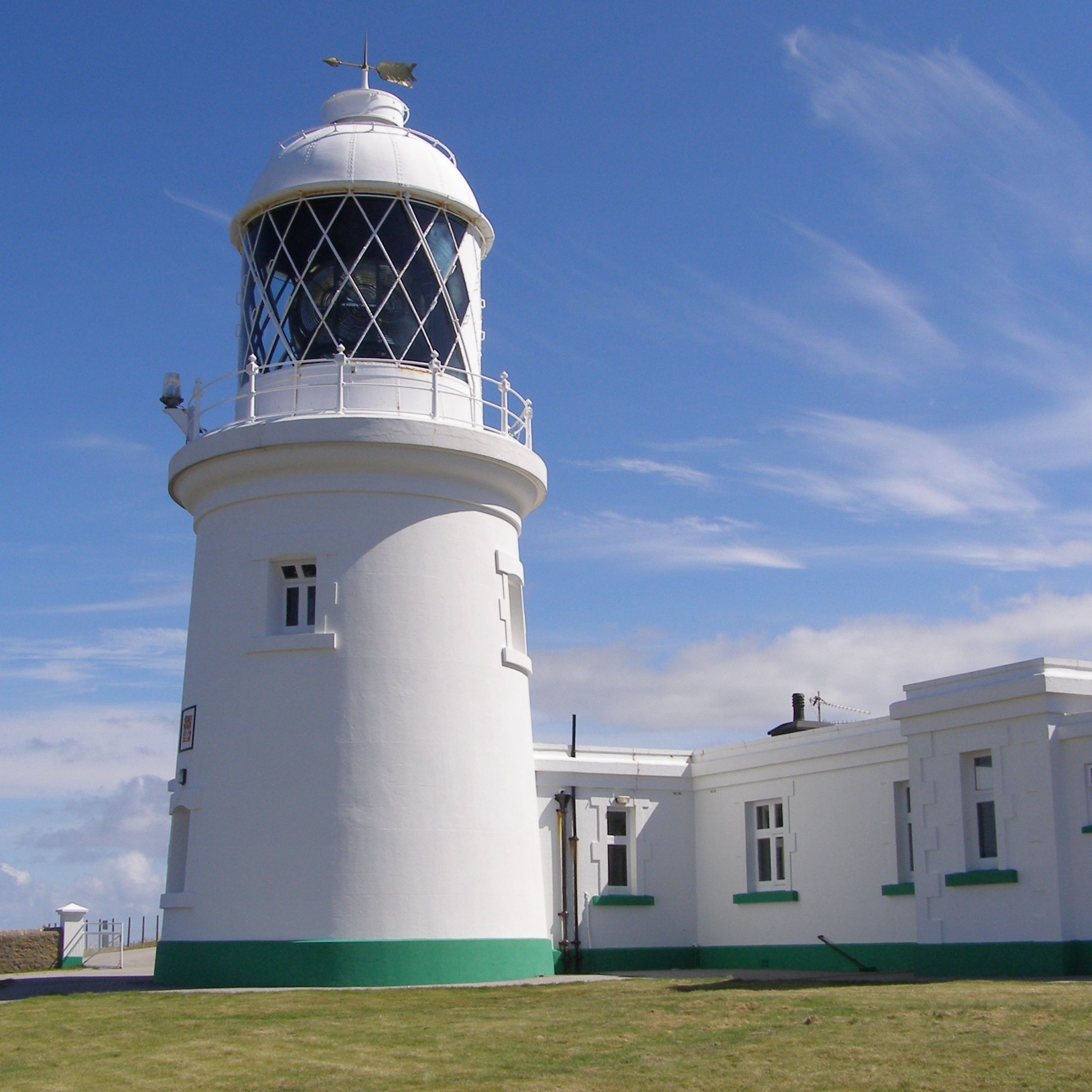 Pendeen Lighthouse at Pendeen Watch, Cornwall